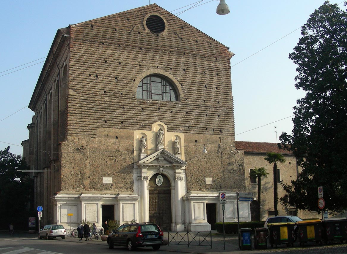 Padova, chiesa del Carmine